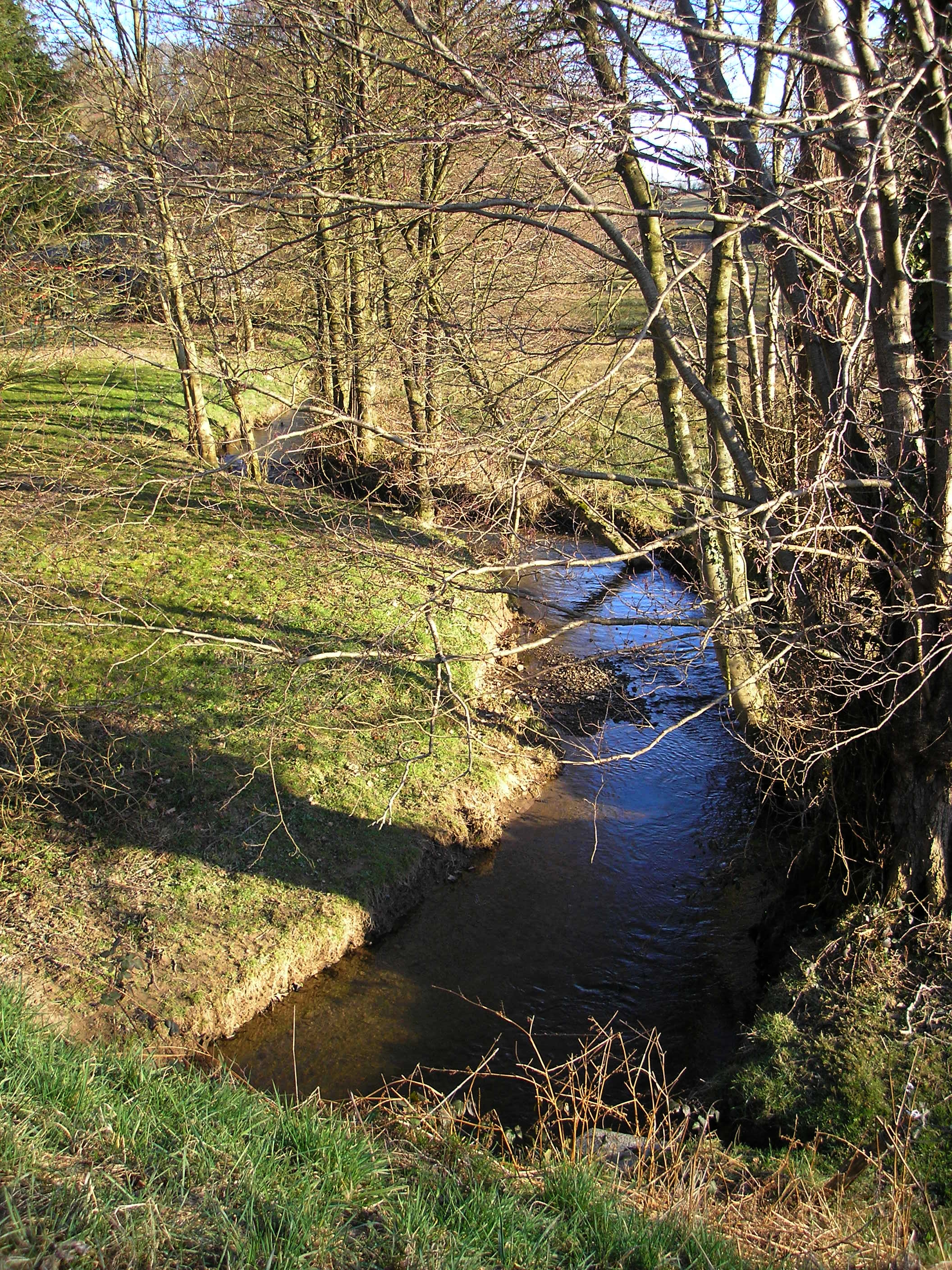 La Soulles entre les territoires des communes de Villebaudon, à gauche, et Maupertuis, à droite (Normandie, France).